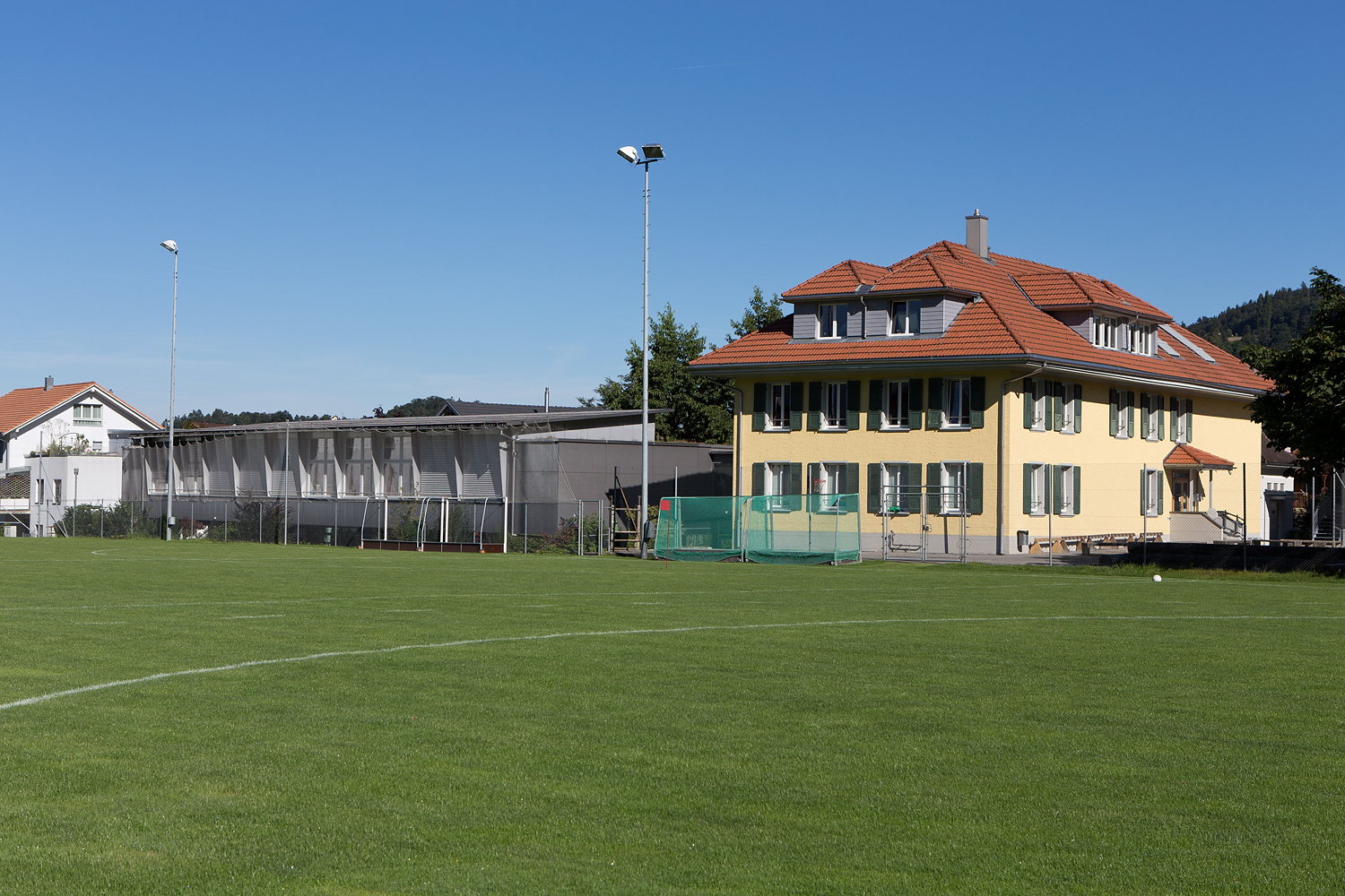 Schulhaus Erlen in Steffisburg